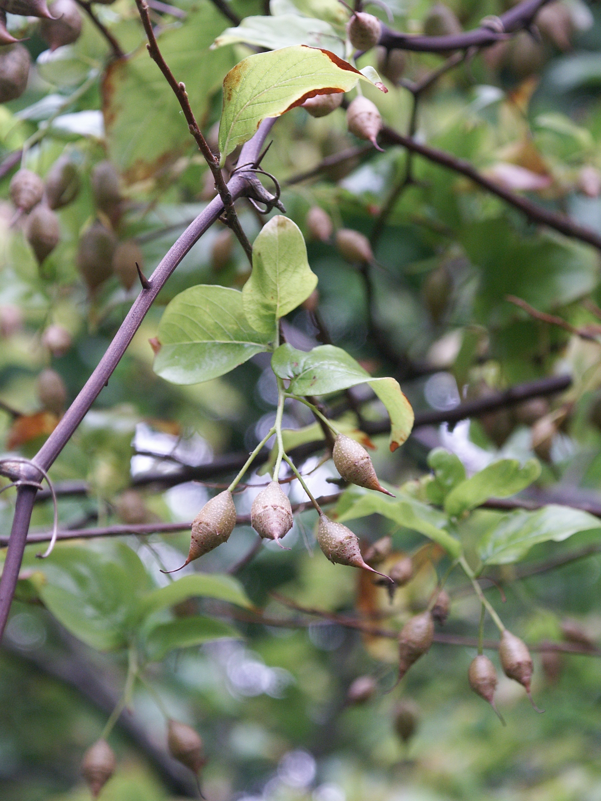 Fruits de Sinojackia rehderiana - Jardin botanique de Strasbourg - France